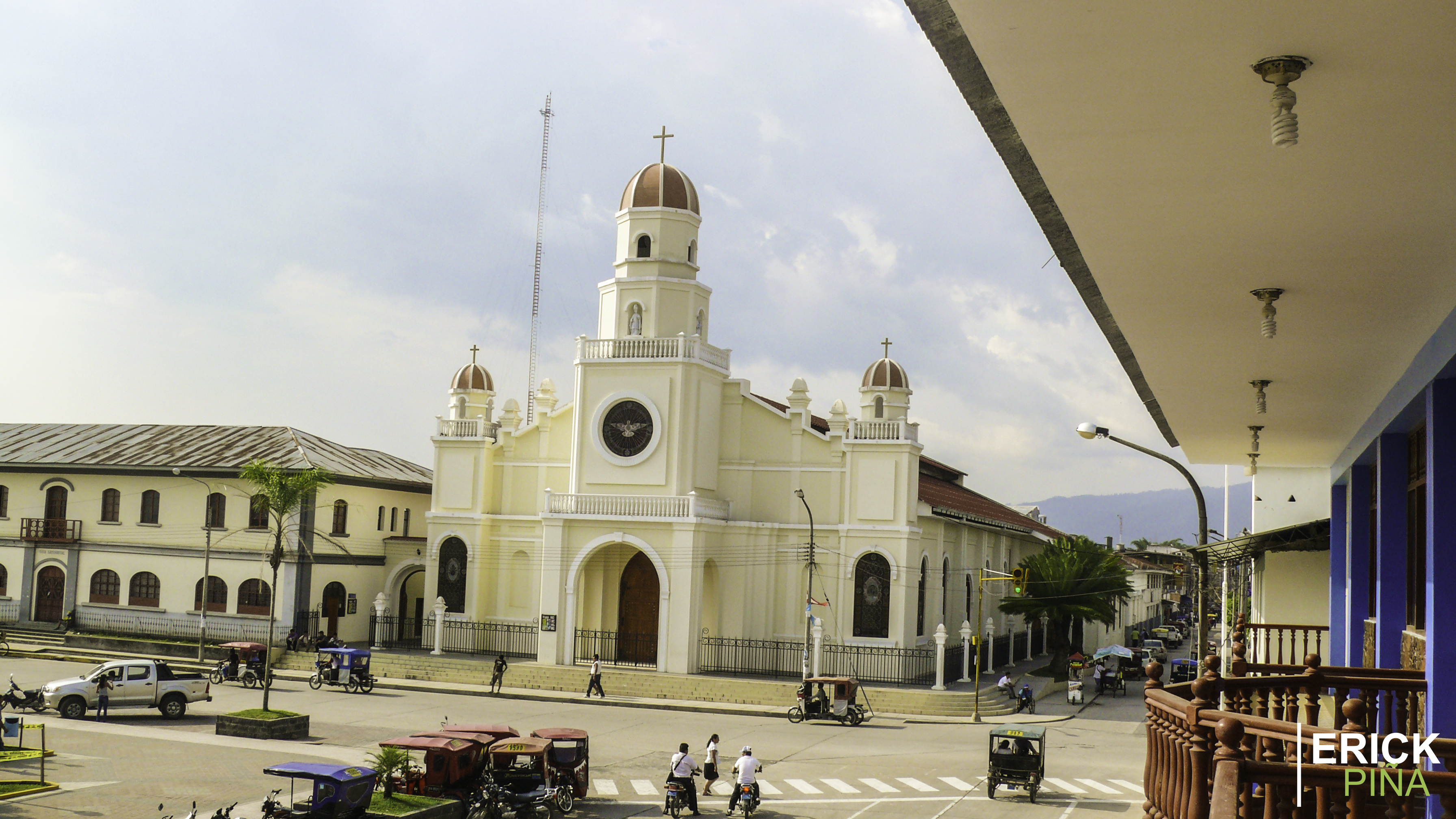 Foto de la Catedral Actual de Moyobamba